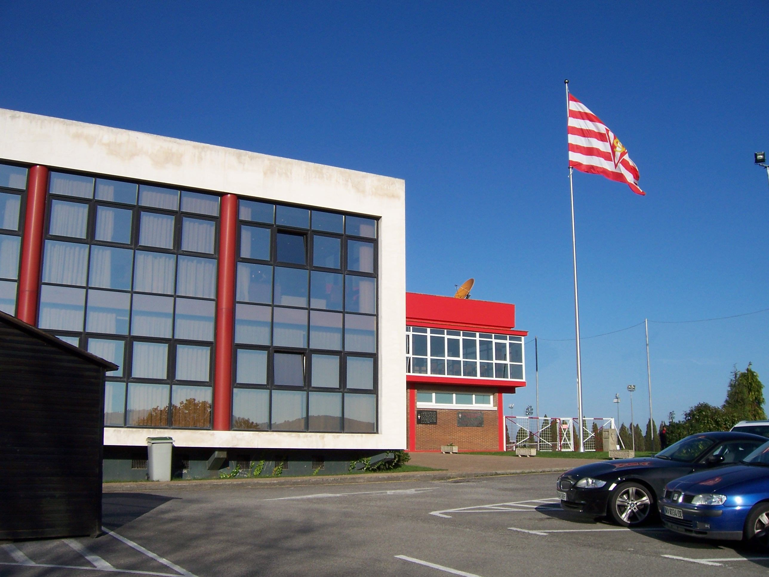 Edificios de la escuela de fútbol de Mareo desde el aparcamiento